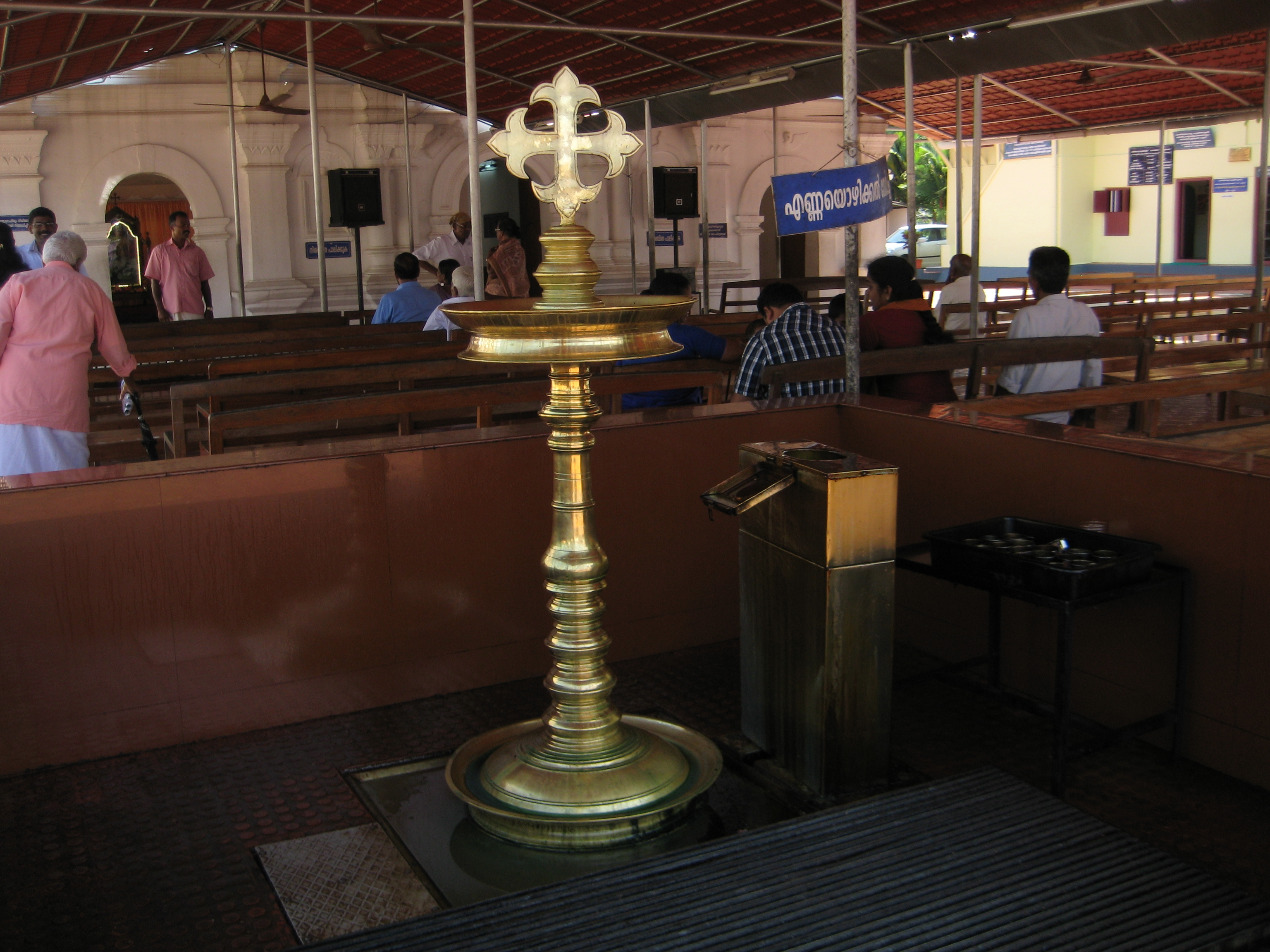 കേരളത്തിൽ വളരെക്കാലം മുൻപ് തന്നെ പ്രചാരത്തിലുണ്ടായിരുന്ന ഒരു പ്രത്യേകതരം വിളക്കാണ് നിലവിളക്ക്. നൂലുകൊണ്ട് തിരികളുണ്ടാക്കി എണ്ണയൊഴിച്ച് തെളിയിക്കുന്ന ഭാഗം ഒരു നിലപോലെ കാണുന്നതുകൊണ്ടാകാം നിലവിളക്കെന്ന പേര് വന്നത്. പല നിലകളിലായി തിരികൾ തെളിയിക്കുന്ന ഭാഗം ഉണ്ടാകാറുണ്ട്. അതുകൊണ്ടാണ് നിലവിളക്കെന്ന് വിളിക്കപ്പെട്ടതെന്നും പറയപ്പെടുന്നു. നിലവിളക്ക് കേരളീയ സംസ്കാരത്തിന്റെ ഭാഗമായതിനാൽ ഇപ്പോൾ സർവ്വസാധാരണയായി പൊതു ചടങ്ങുകളും മറ്റും നിലവിളക്ക് കൊളുത്തിയാണ് ആരംഭിക്കുന്നത്. ചിലപ്പോൾ നിലവിളക്ക് കൊളുത്തി ഉത്ഘാടനവും നടത്താറുണ്ട്. ഹിന്ദുമത വിശ്വാസികൾ വീടുകളിലും ക്ഷേത്രങ്ങളിലും പ്രാർത്ഥന / ആരാധനയുടെ ഭാഗമായി വ്യാപകമായി ഈ വിളക്ക് ഉപയോഗിക്കാറുണ്ട്. ഹൈന്ദവ വിശ്വാസപ്രകാരം നിലവിളക്ക് കൊളുത്തുന്നതിനും ഉപയോഗിക്കുന്നതിനും ചില പ്രത്യേക ചിട്ടകൾ പരിപാലിക്കാറുണ്ട്. കേരളത്തിൽ സർവ്വസാധാരണയായി കണ്ടുവരുന്ന നിലവിളക്ക് അതേ മാതൃകയിലും ചിലപ്പോൾ നിലവിളക്കിന്റെ മുകൾ ഭാഗം കുരിശിന്റെ ആകൃതിയിൽ രൂപമാറ്റം വരുത്തിയും, മറ്റു ചിലപ്പോൾ അതിനുമുകളിൽ പ്രാവിന്റെ രൂപവും ചേർത്ത് കൃസ്ത്യൻ പള്ളികളിലും വീടുകളിലും നിലവിളക്ക് ഉപയോഗിക്കാറുണ്ട്. ഇപ്പോൾ പലയിടങ്ങളിലും നിലവിളക്കിൽ എണ്ണയൊഴിക്കുന്നതും വിവാഹം പോലെയുള്ള അവസരങ്ങളിൽ വധുവരന്മാർ നിലവിളക്ക് കൊളുത്തുന്നതും ആചാരമായി കണ്ടുവരുന്നു. കേരളത്തിലെ ഒരു കൃസ്ത്യൻ പള്ളിയിൽ ഉപയോഗിക്കുന്ന നിലവിളക്കിന്റെ മാതൃകയാണിവിടെ ചേർത്തിരിക്കുന്നത്.